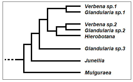 Verbeneae_-_Cladogramma_della_tribù